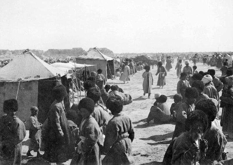 По туркменским пескам. Базар в Мерве